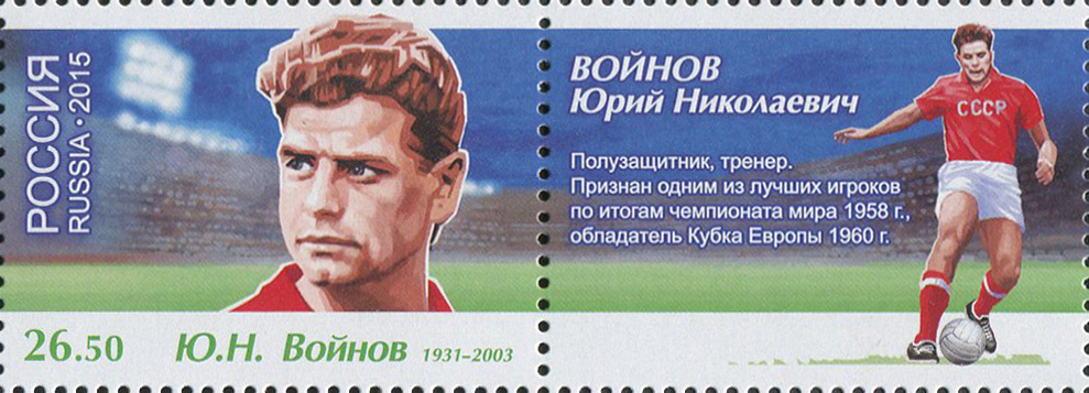 Чемпионат мира по футболу FIFA 2018 в России. Легенды футбола.Ю.Н. Войнов (1931-2003)